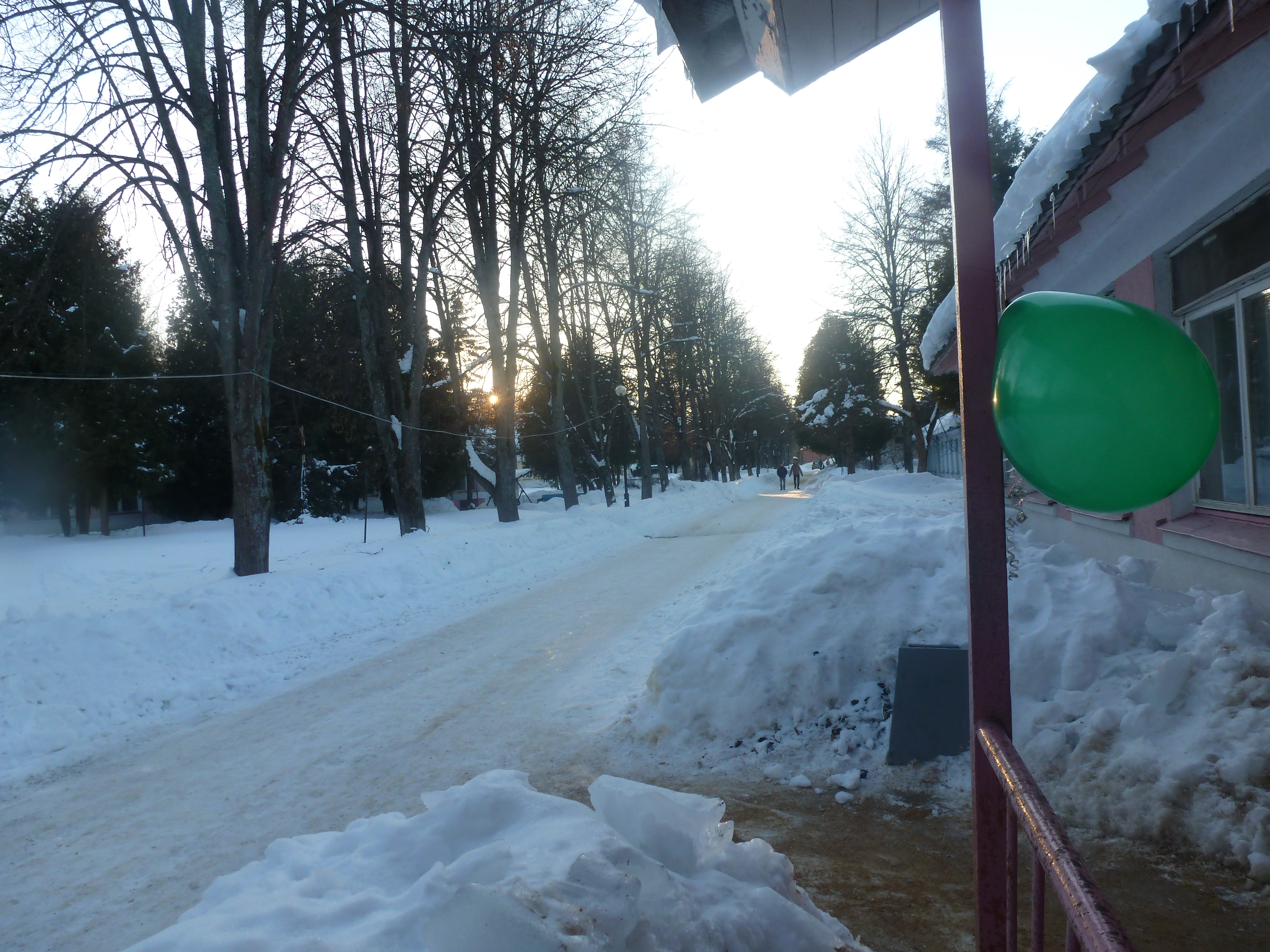 En la ripozejo Jerŝovo apud la domo numero 5, dum la evento APERO-7 de la Moskva Esperanto-Asocio "MASI" la 23-an de februaro 2013